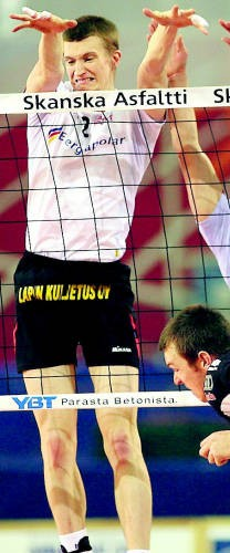 Jukka Lehtonen blocking